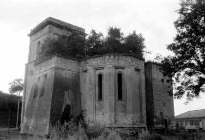 Buszcze - Kościół Wniebowzięcia Najświętszej Maryi Panny